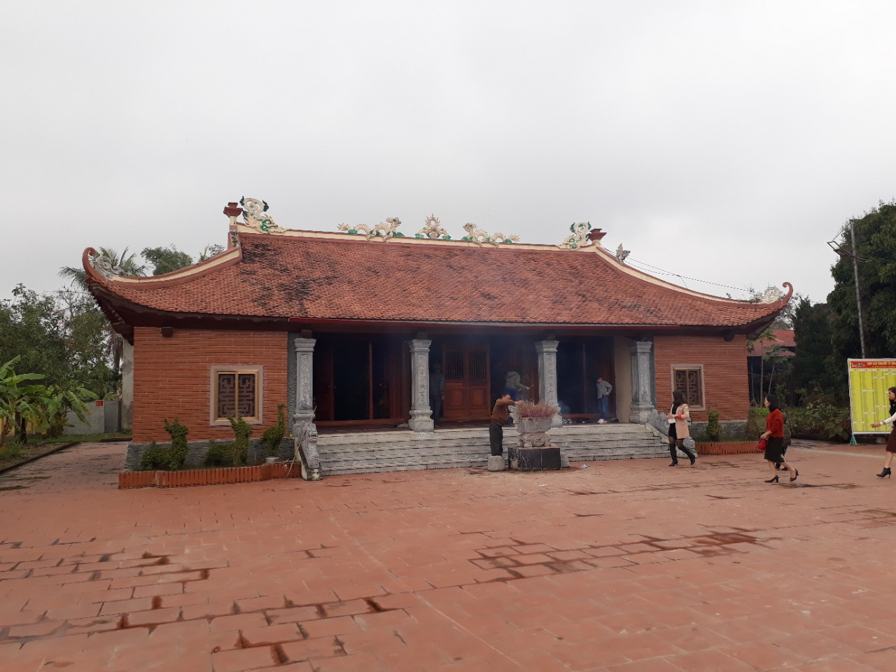 Nghè Xuân Phả ở xã Xuân Trường - Thọ Xuân - Thanh Hóa